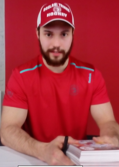 Po zakončení sezóny 2016/17 na autogramiádě ve Werk Areně